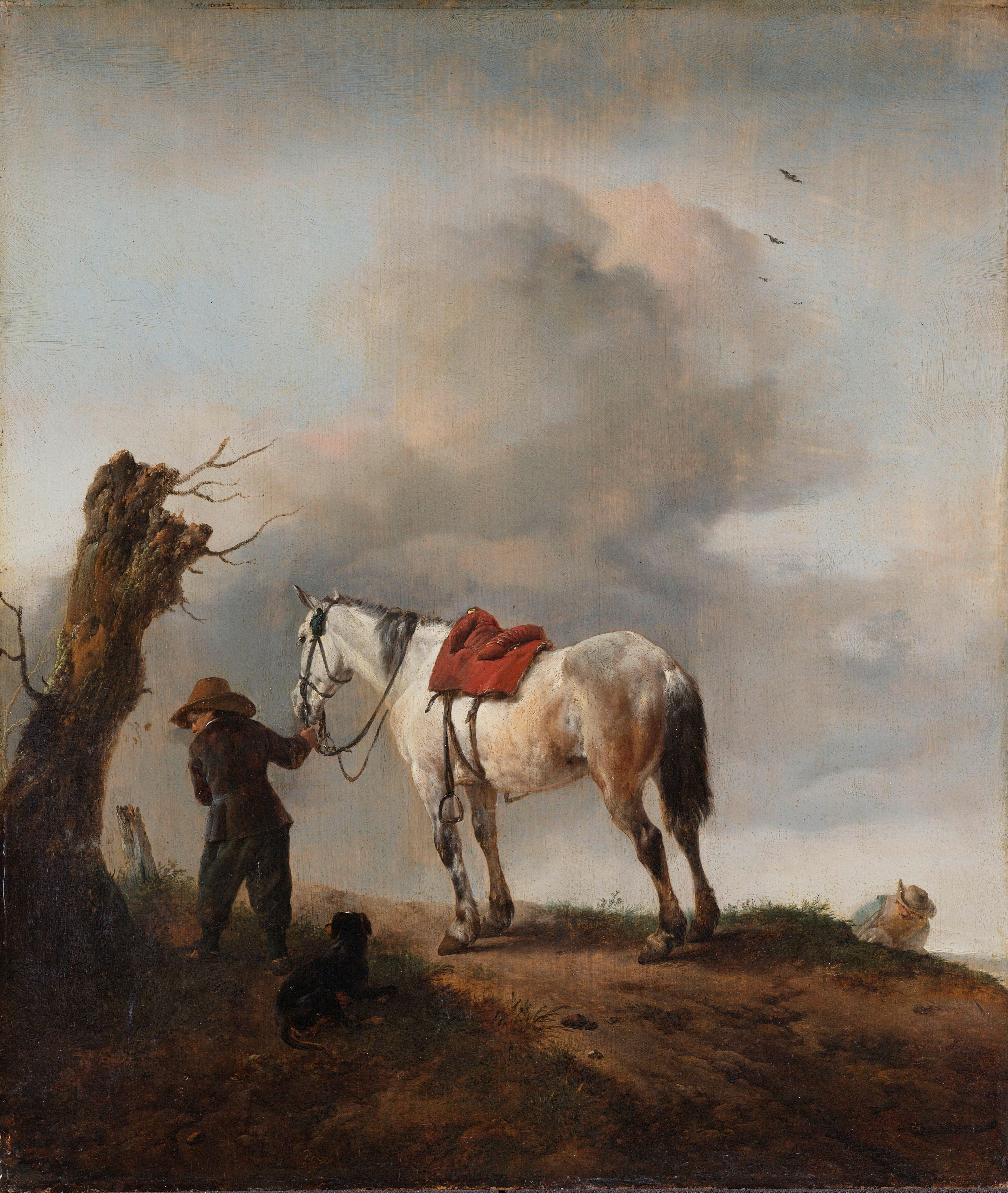 Staande op een heuvel houdt een jongen een wit paard bij de toom terwijl rechts de ruiter gehurkt zijn behoefte doet.; Philips Wouwerman (1619–1668), olieverf op paneel, ca. 1646